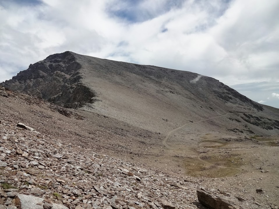 Mulhacen desde Laguna Caldera